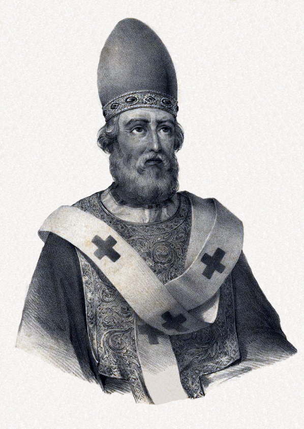 Lithography of Pope Saint Damasus I (Lisboa, 1840).